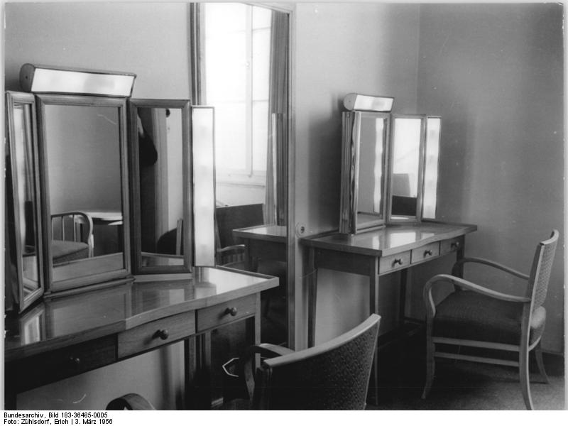 Zentralbild Zühlsdorf 3.3.56 Vom Umbau des Deutschen Theaters in Berlin. Der erste Abschnitt des Umbaus des Deutschen Theaters Berlin ist mit der Fertigstellung des Garderobenflügels abgeschlossen. UBz: Blick in eine Solistengarderobe.